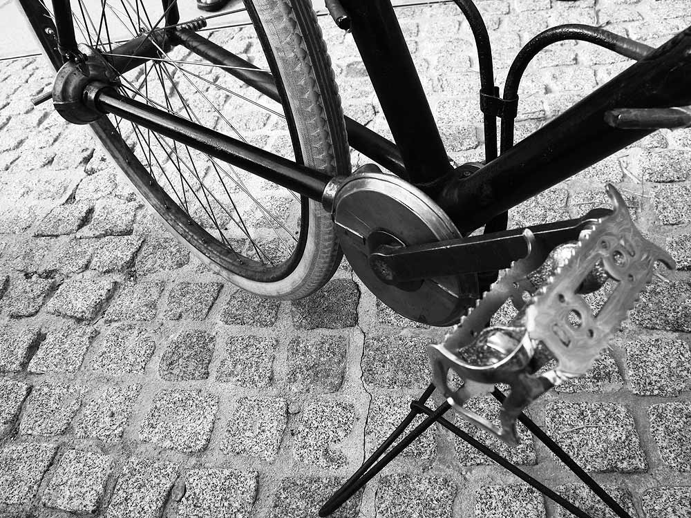 Die Kardanwelle des 1899er "Graziosa chainless" von Albl, Graz